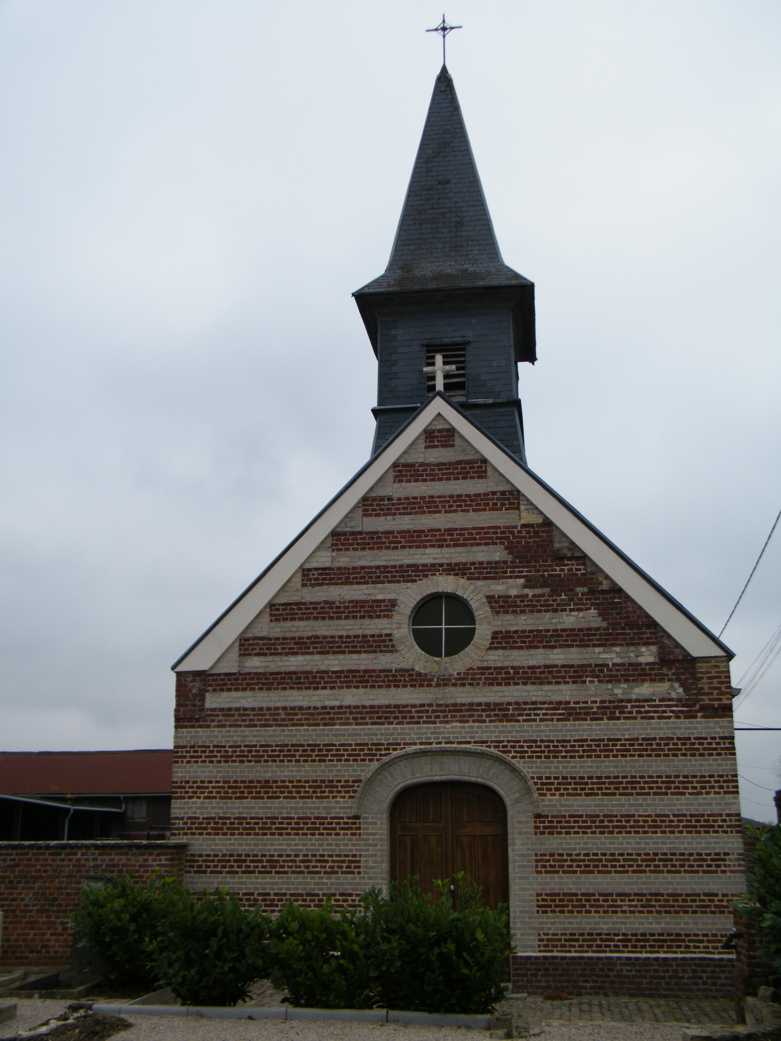 église.